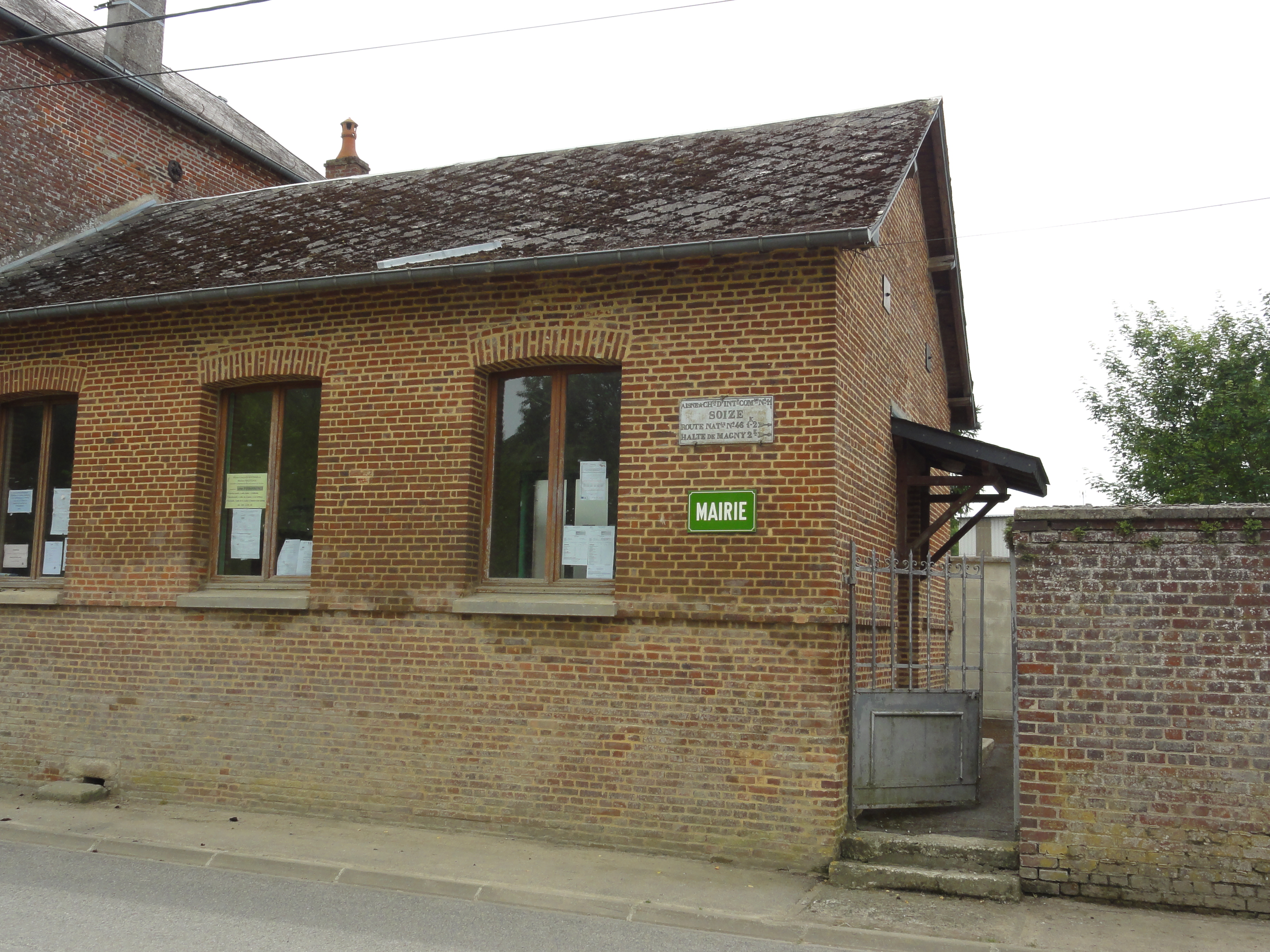 Soize (Aisne) mairie